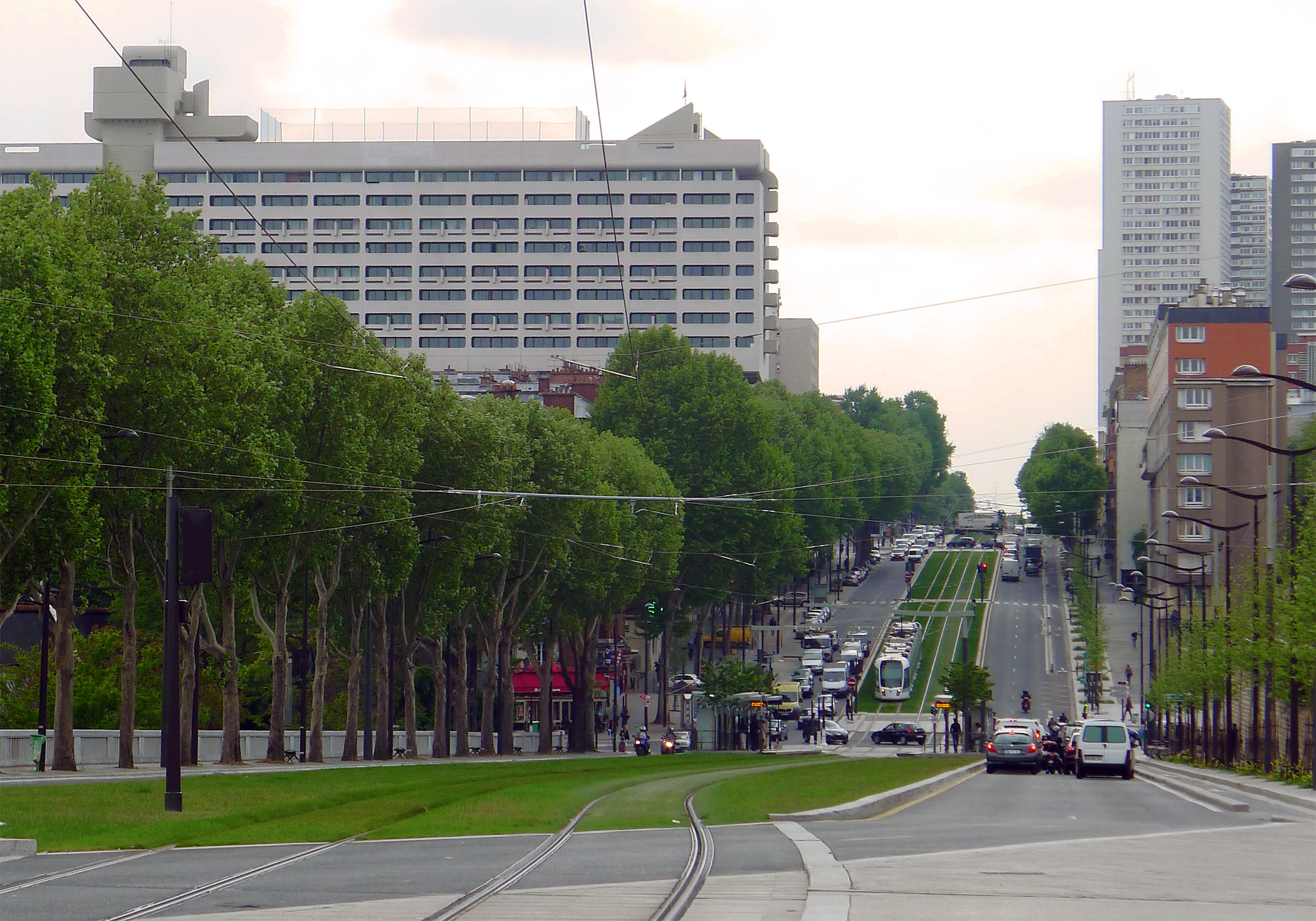 Boulevard Masséna et ligne de tramway T3a - Paris XIII